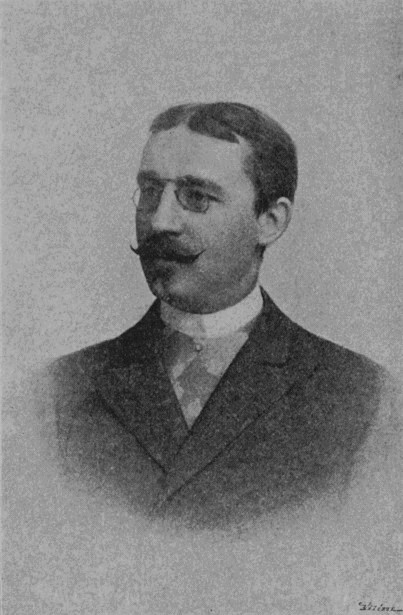 Antonin Turek, český architekt